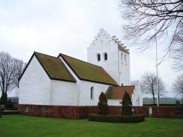 Bjergager Kirke / Bjergager Church, Jutland, Denmark